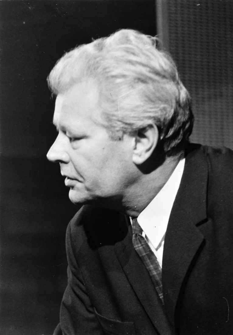 Freiburg im Breisgau: Städtische Bühnen; Volker von Collande